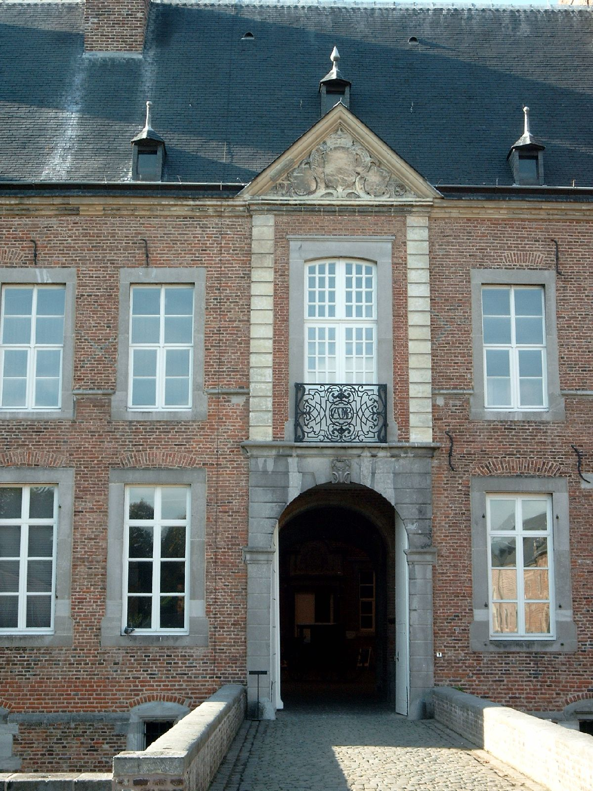 Tor der Kernburg des Schlosses Alden Biesen